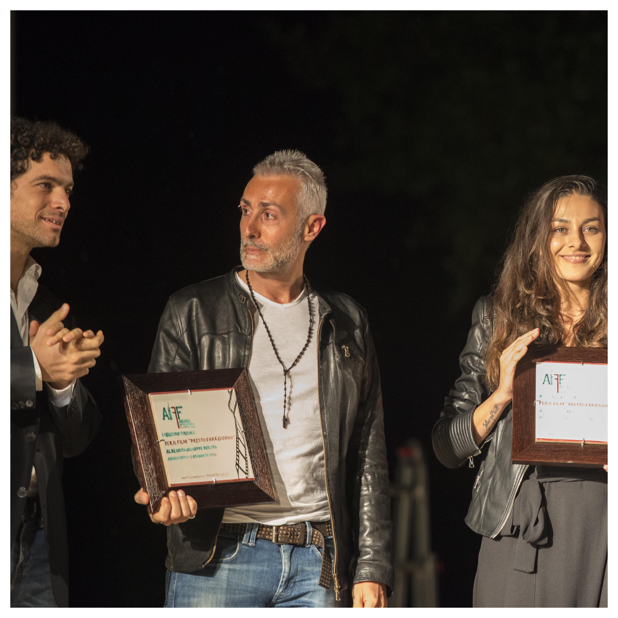 Consegna della targa per la premiazione del film Presto farà giorno